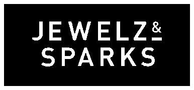 Logo des deutschen DJ-Duos Jewelz & Sparks